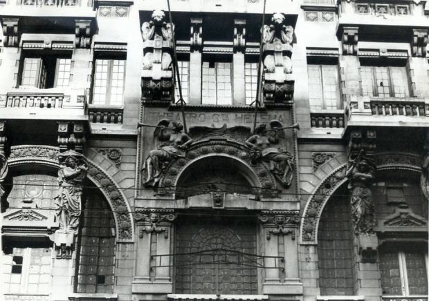 Detalhe mostra as esculturas esculpidas em cimento na fachada do Theatro Santa Helena.